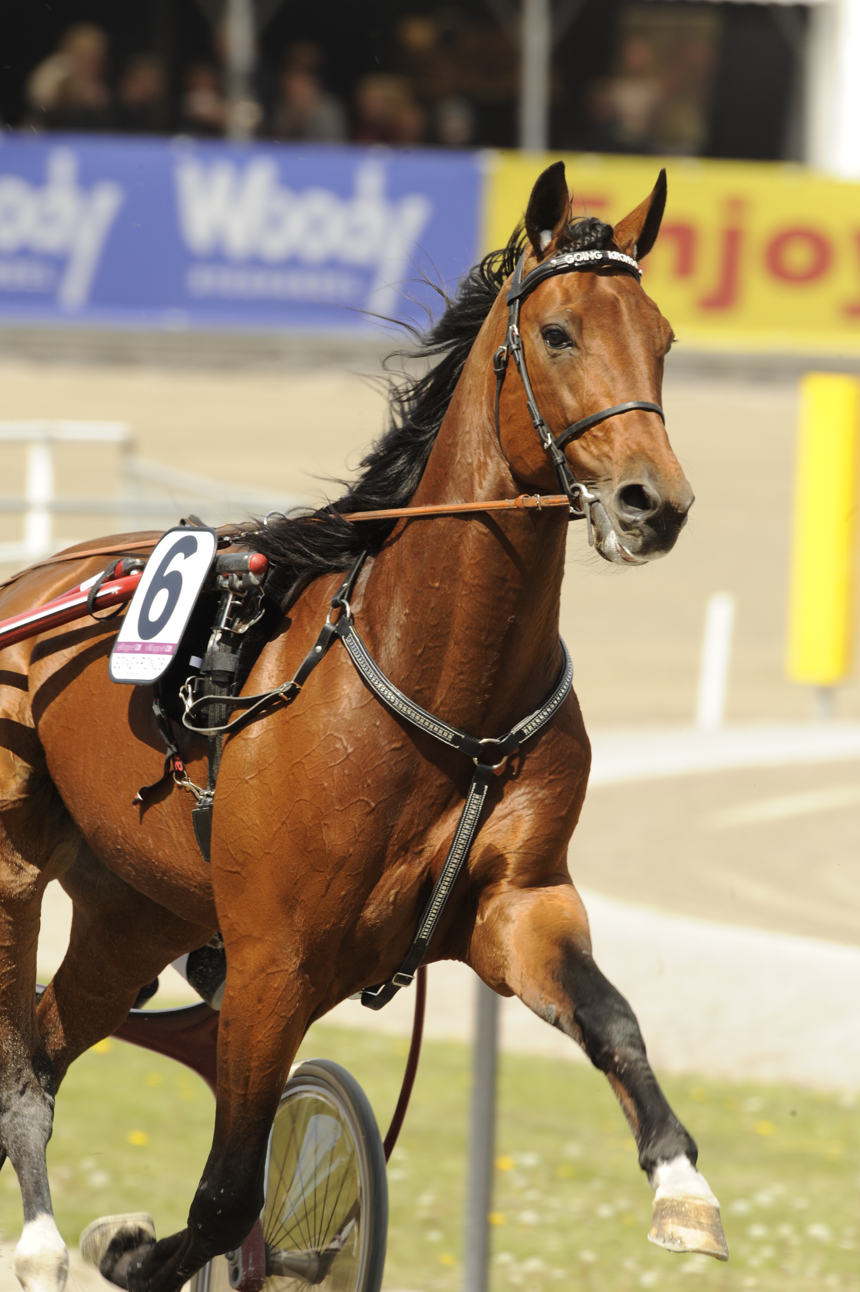 Travaren Going Kronos.